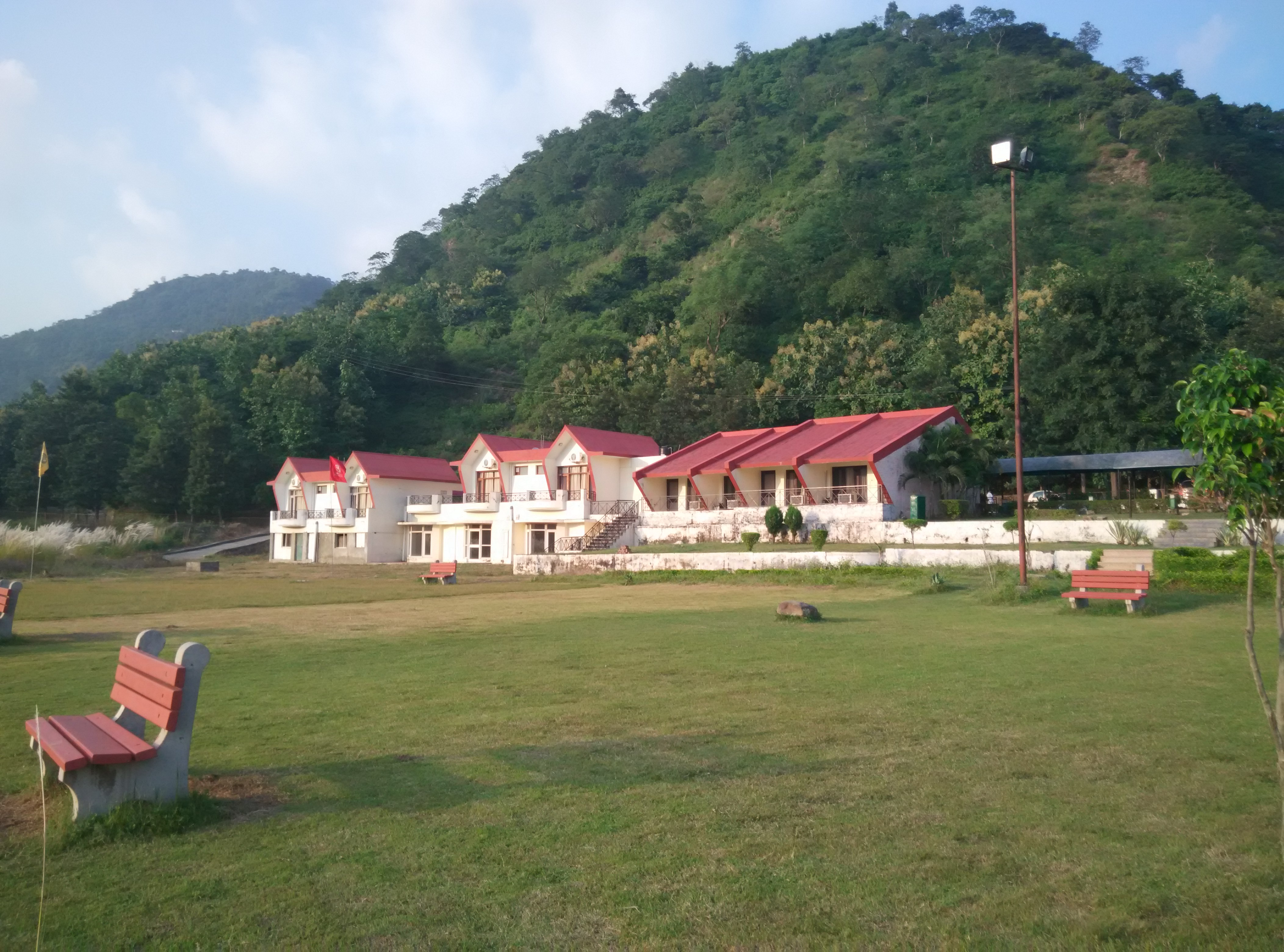 Tikkar Taal, Morni Hills, District Panchkula, Haryana, India